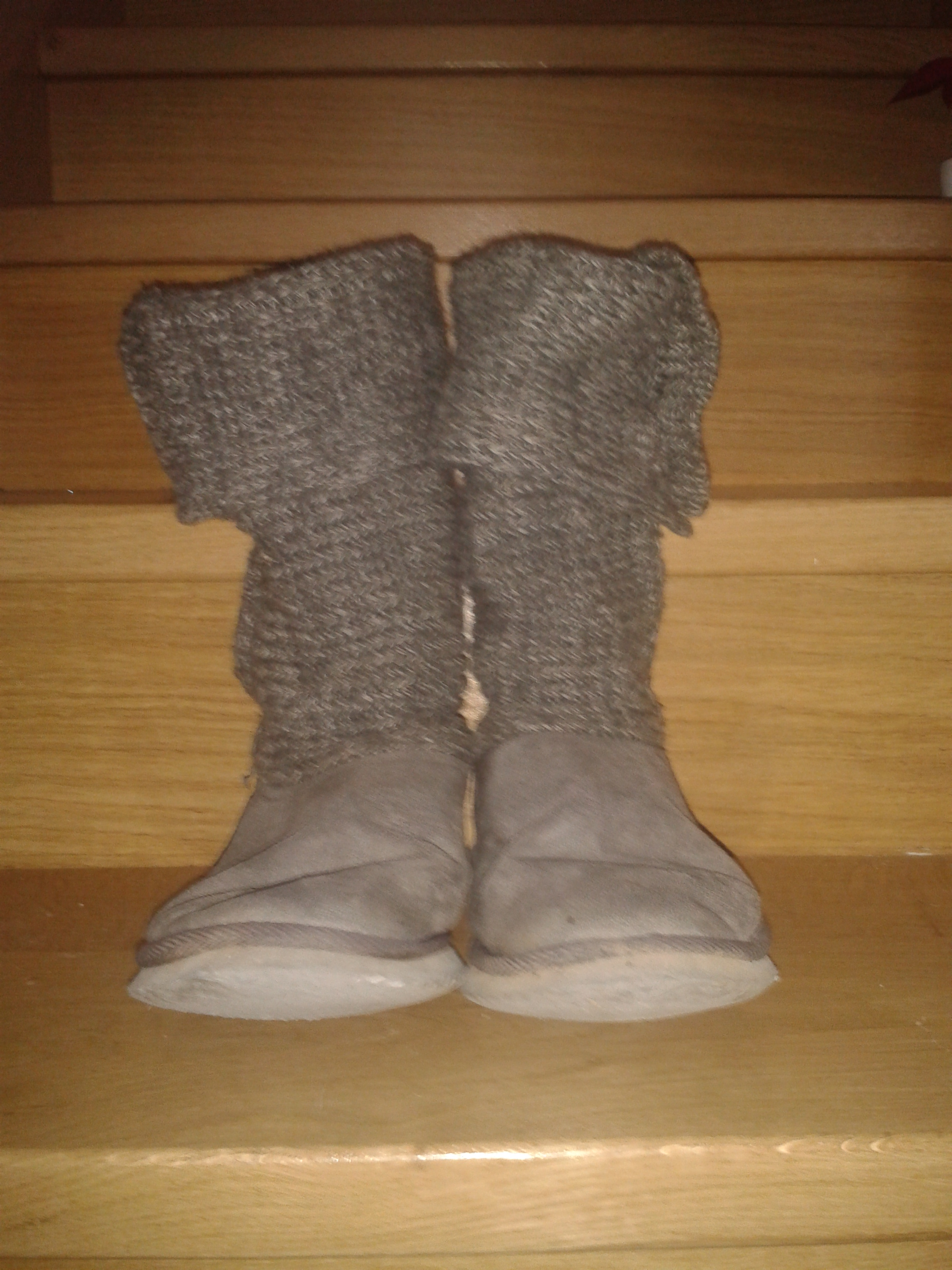 Ugg škornji sive barve zgoraj narejeni kot nogavice.